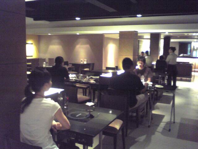 Coca Restaulant Siam square, Bangkok